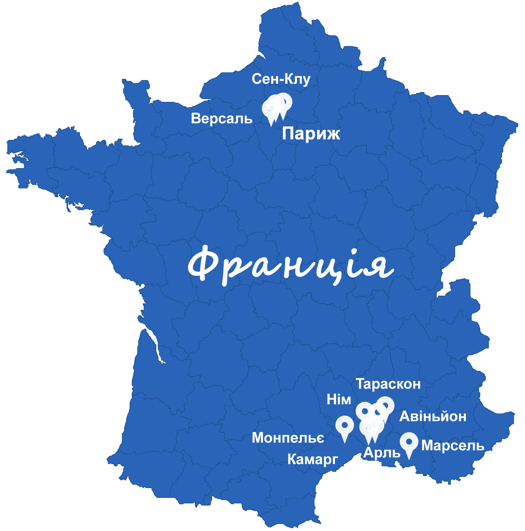 Париж, Версаль, Сен-Клу, Авіньйон, Арль, Тараскон, Марсель, Нім, Камарг, Монпельє